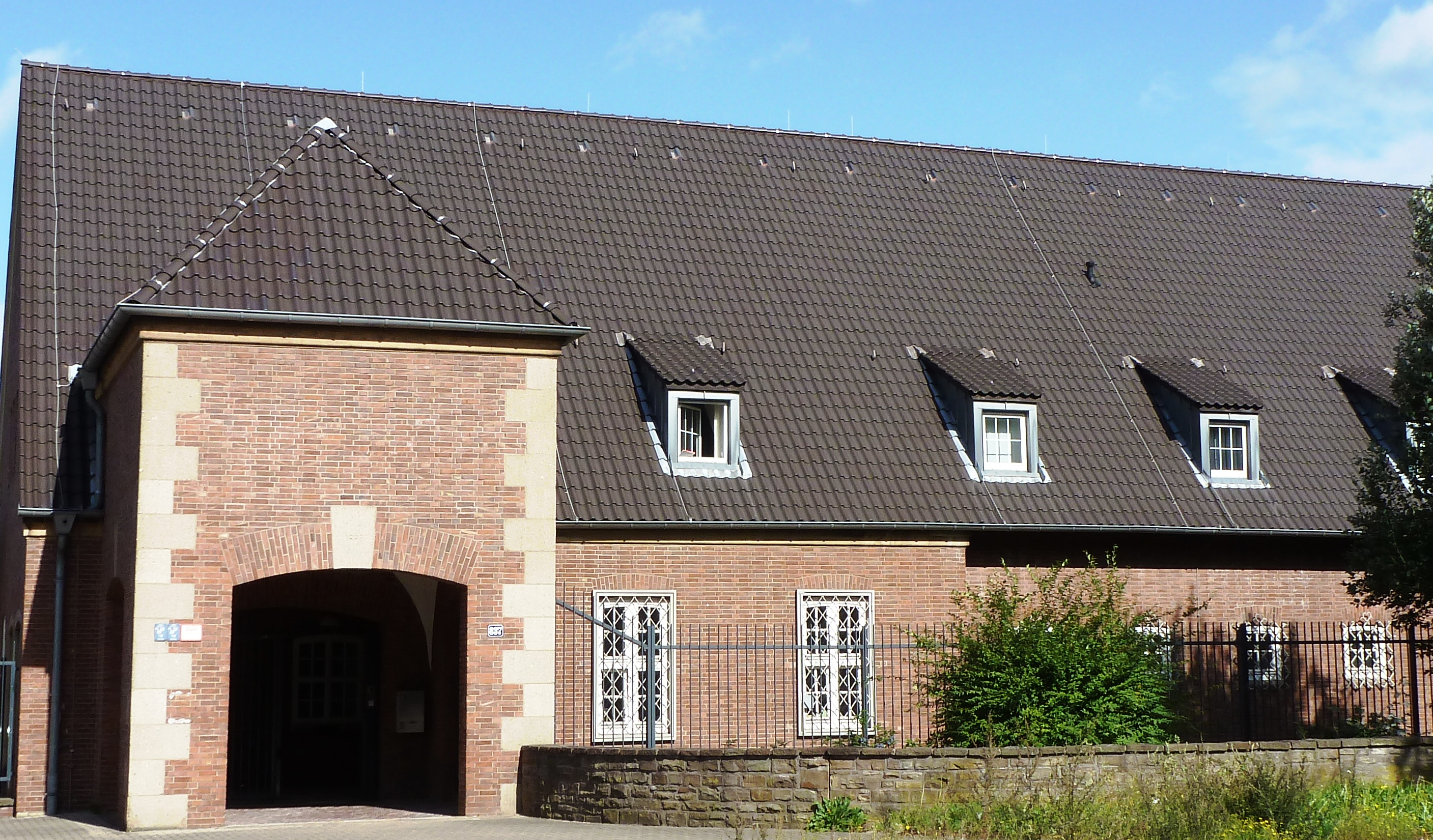 Teil der ehemaligen Kaserne Moorslede, Bergisch Gladbacher Str. 83? in Köln-Dellbrück, Denkmal-Nr. 7529